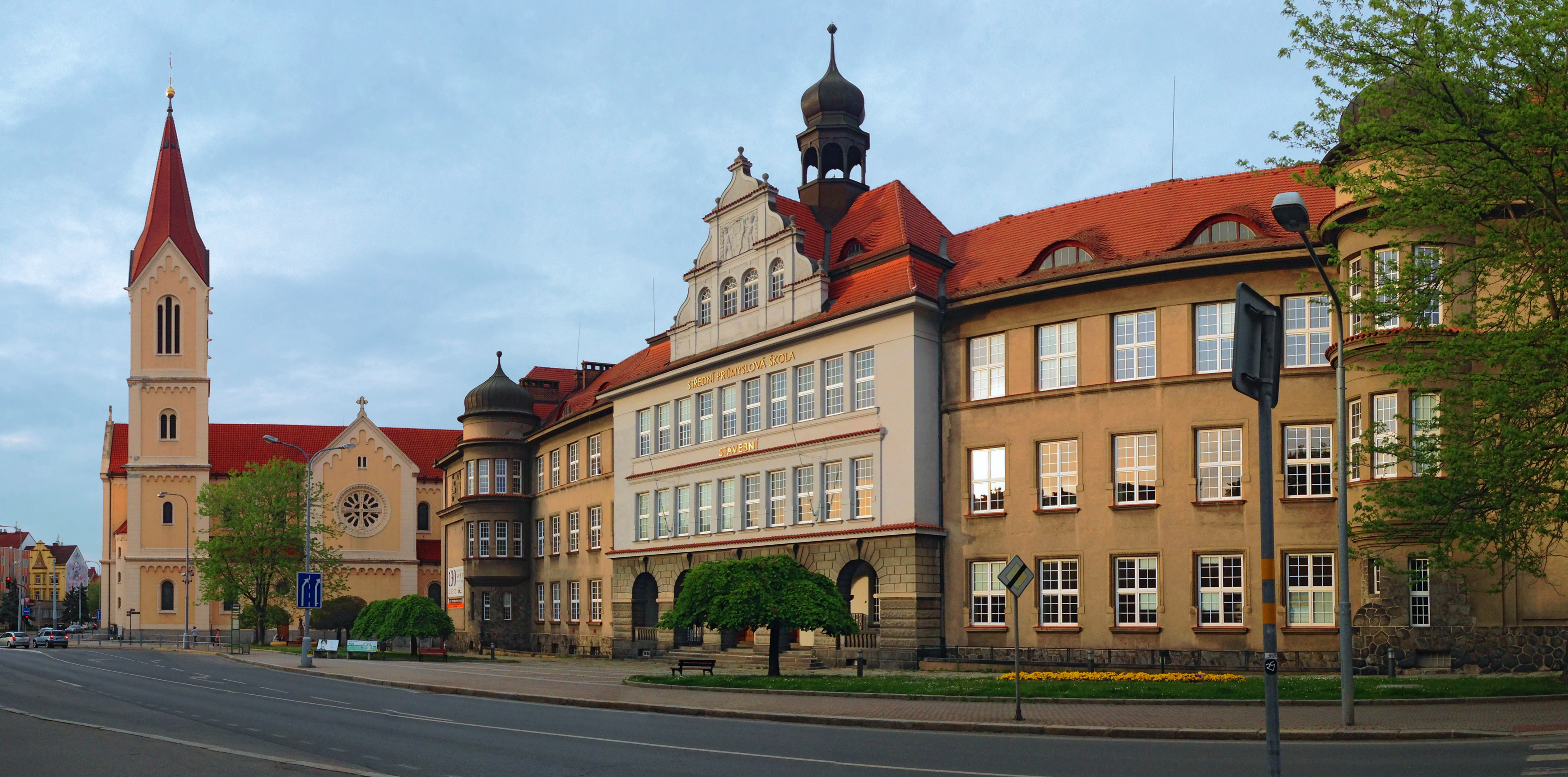 Střední průmyslová škola stavební, Chodské náměstí 1585/2, Soukenická 1585/2, Kozinova 1585/1, parc. 6416, Plzeň 3-Jižní Předměstí, Plzeň.